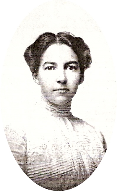 Depicted person: Mary Hefferan